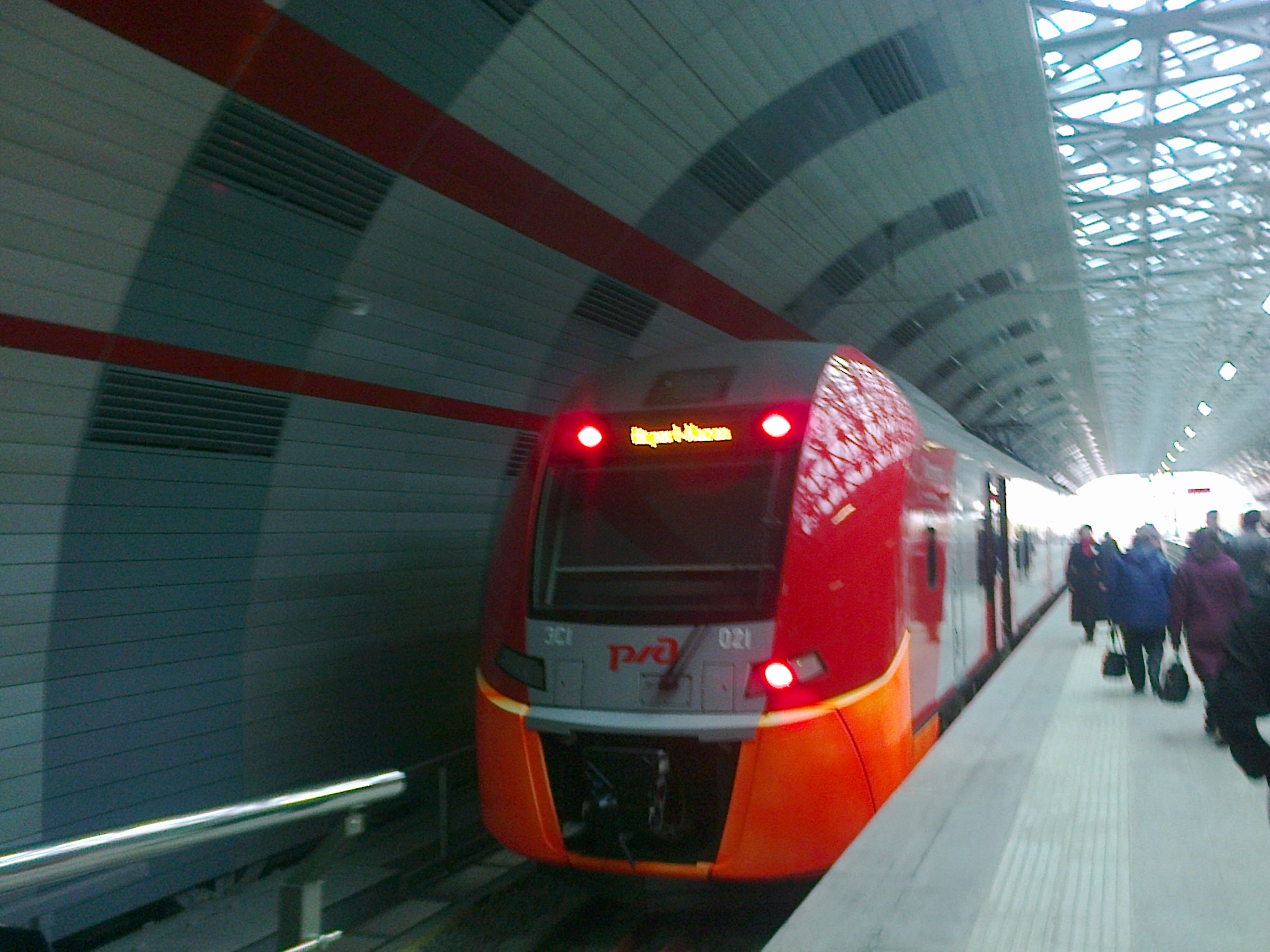 Электропоезд ЭС1-021 Ласточка - Казанский аэроэкспресс